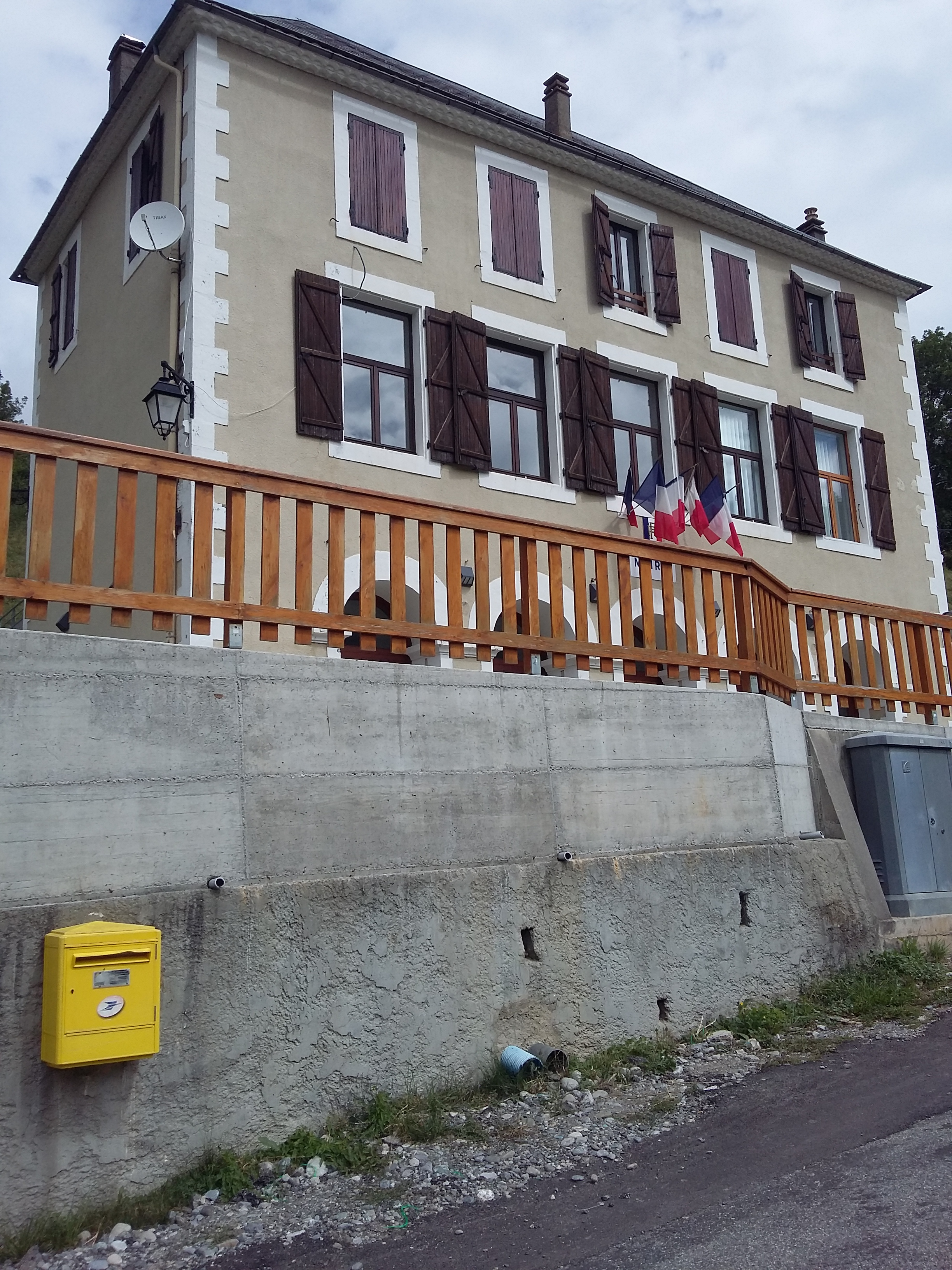 Ecole des garçons (ancienne) - Mairie actuelle